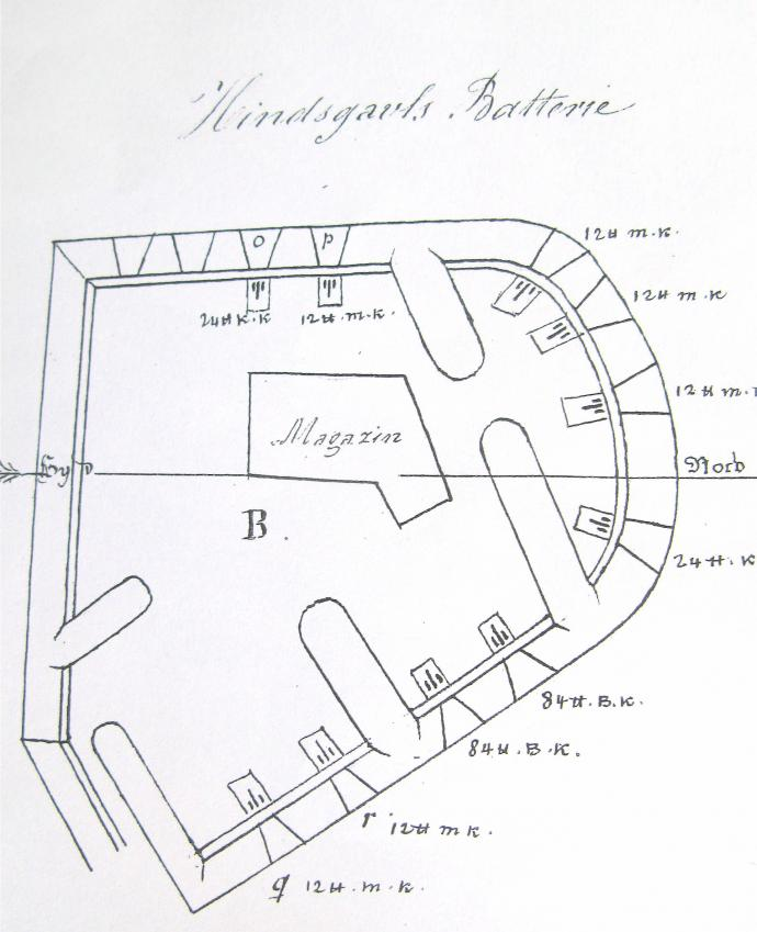 Vasnæs Batteri skitse fra 1848, produceret af Christian Julius de Meza.